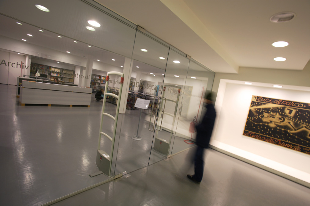 Biblioteca del Progetto, ingresso